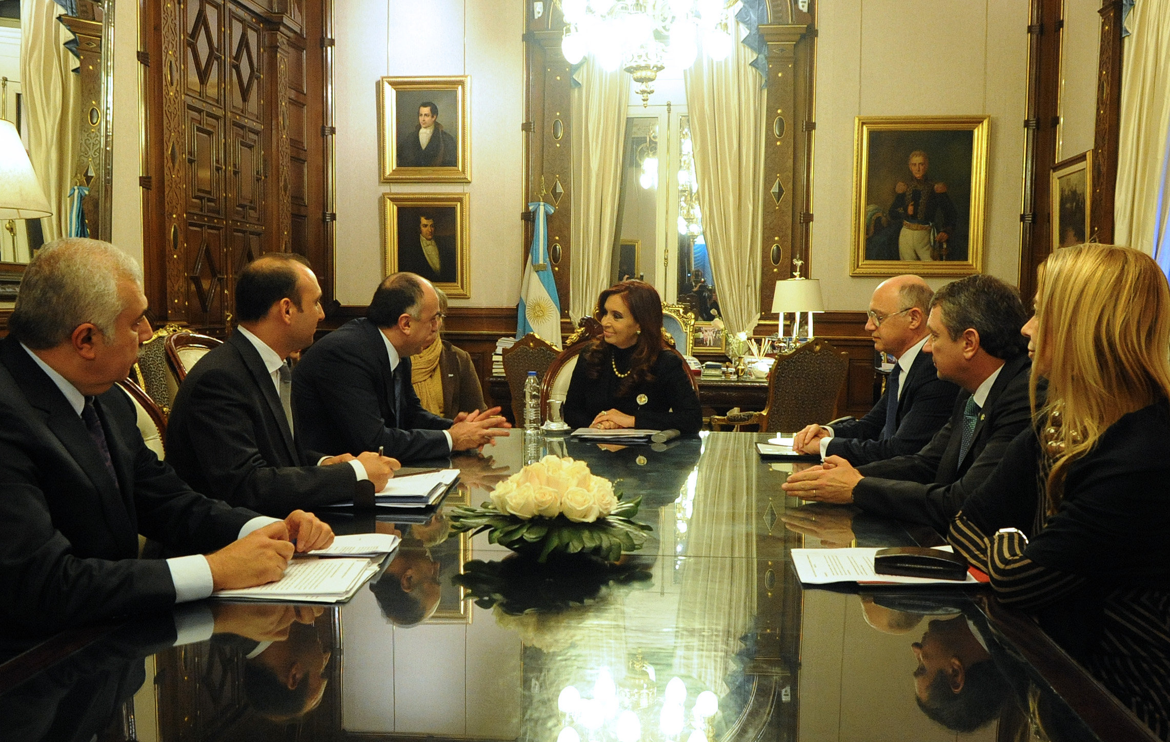 La presidenta Cristina Fernández, acompañada por miembros de su gabinete, recibió esta tarde en su despacho de Casa Rosada al canciller de Azerbaiyan, Elmar Mammadyarov.